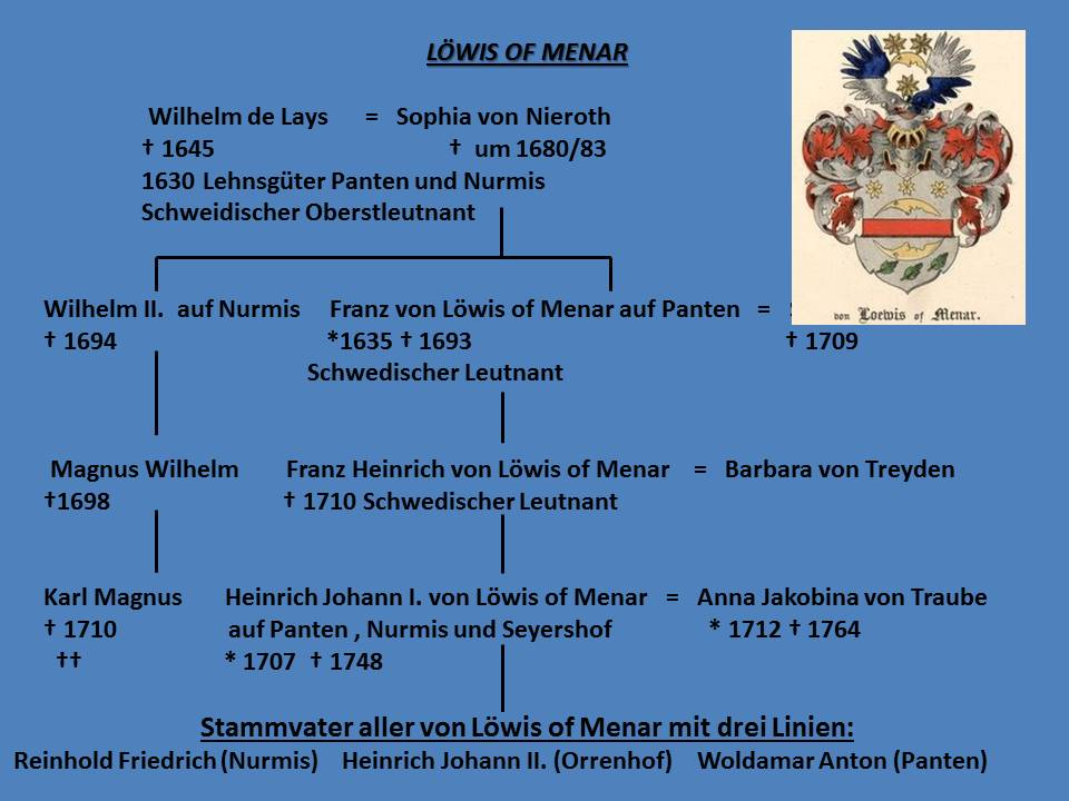 Stammvater der Familie Löwis of Menar (Stammbaum)